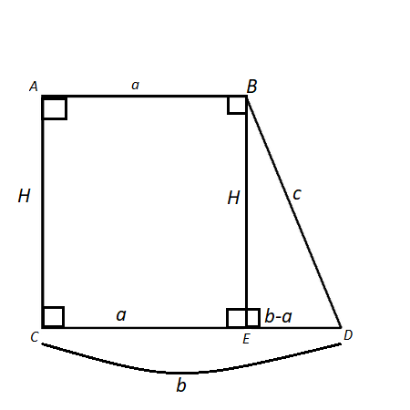 düzbucaqlı trapesiyanın xassəsi